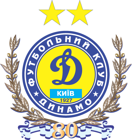 Емблема ФК Динамо в період січень — Грудень 2007 року.